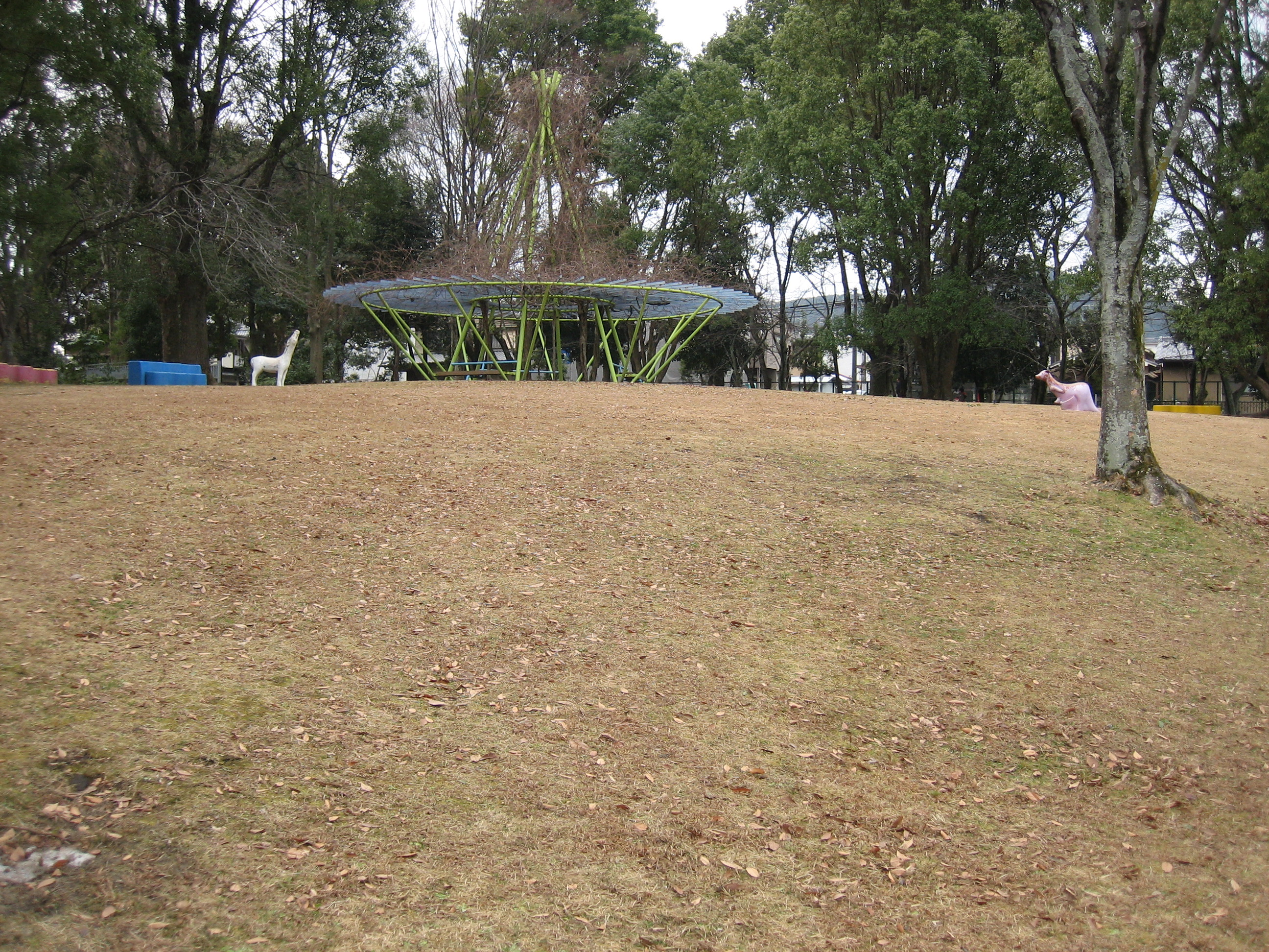 大宮交通公園を園内から撮影